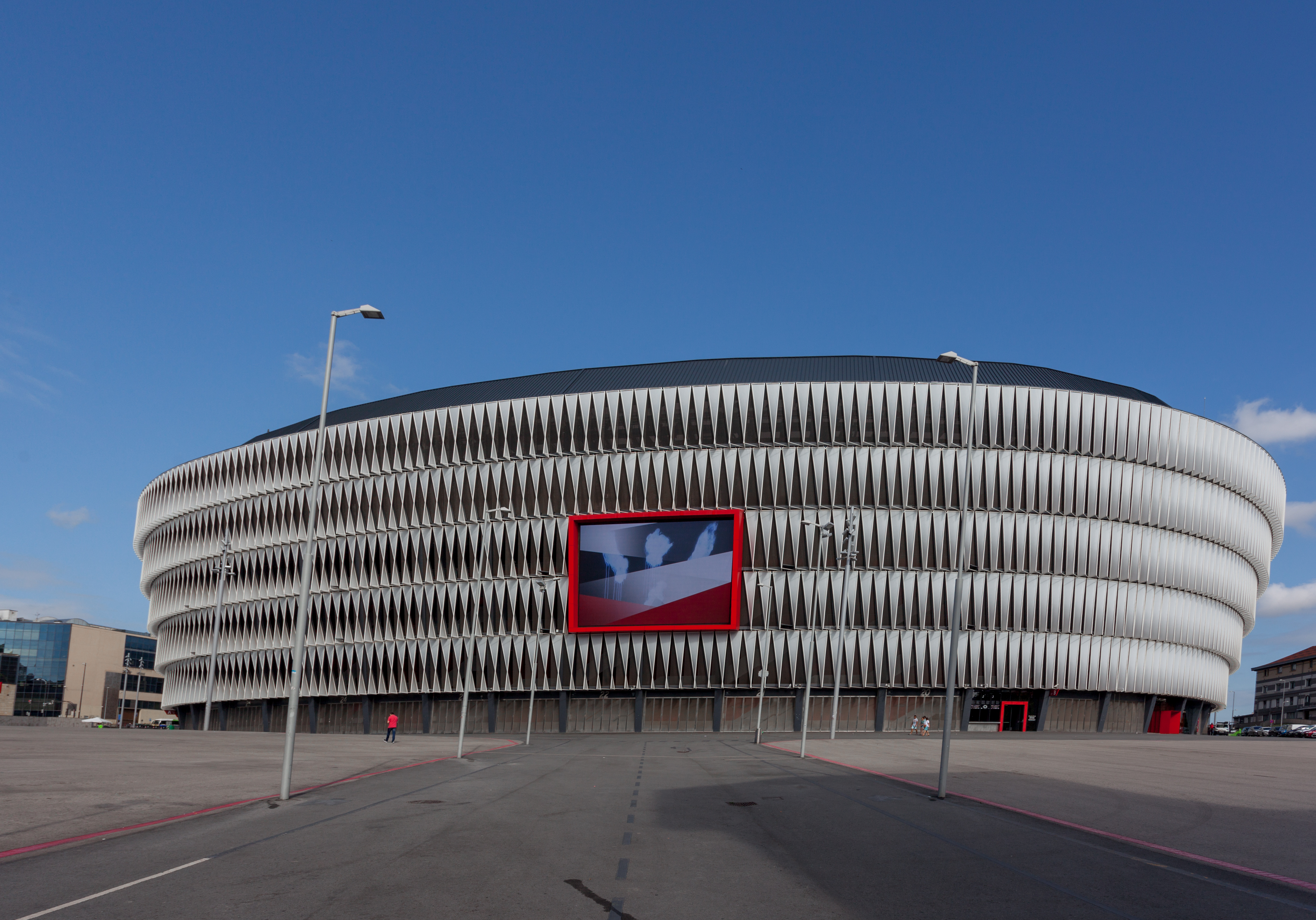 Außenansicht des Stations San Mamés